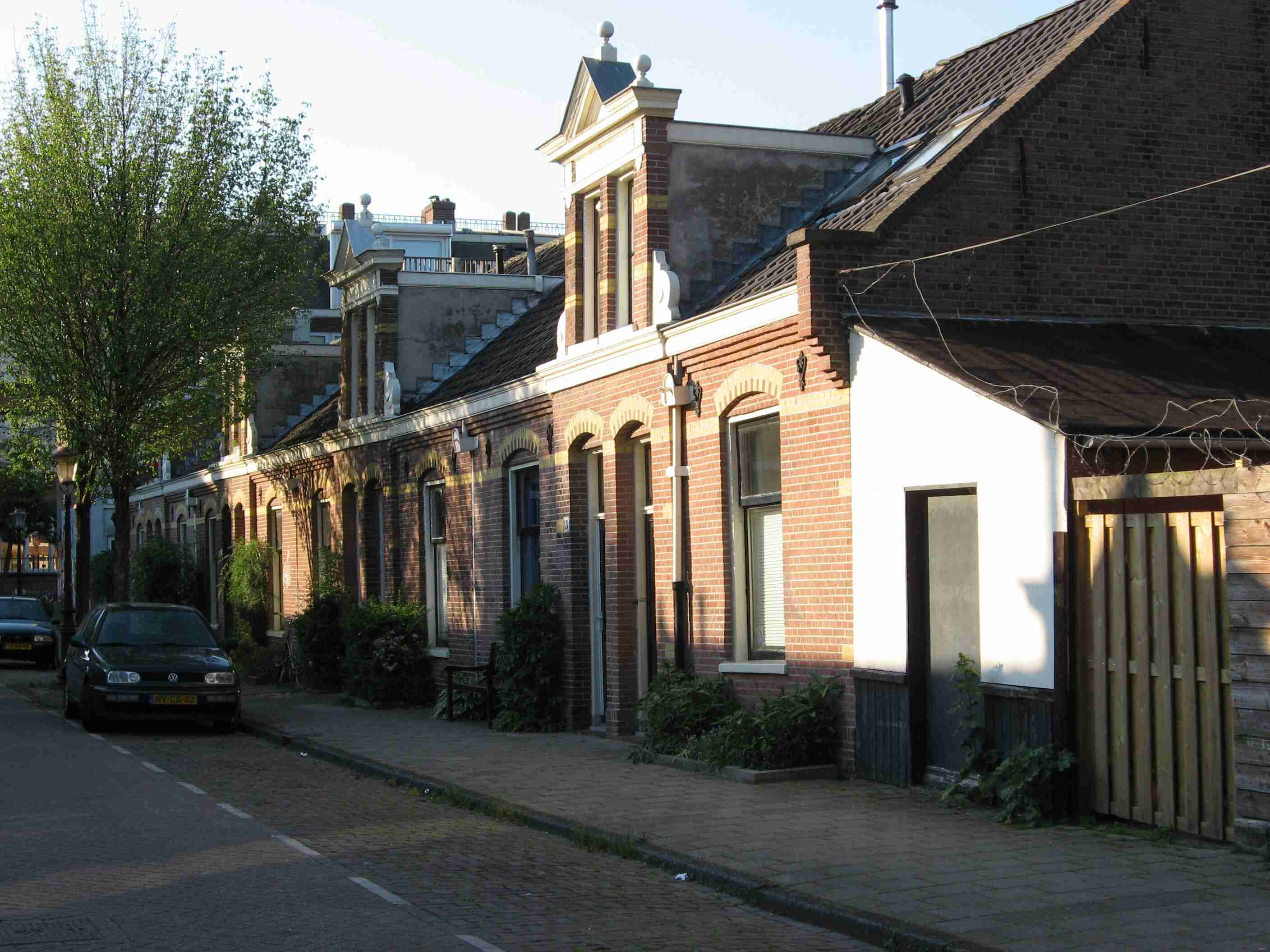 Diamantbuurt, 19e eeuwse arbeidershuisjes in Diamantstraat 1-15